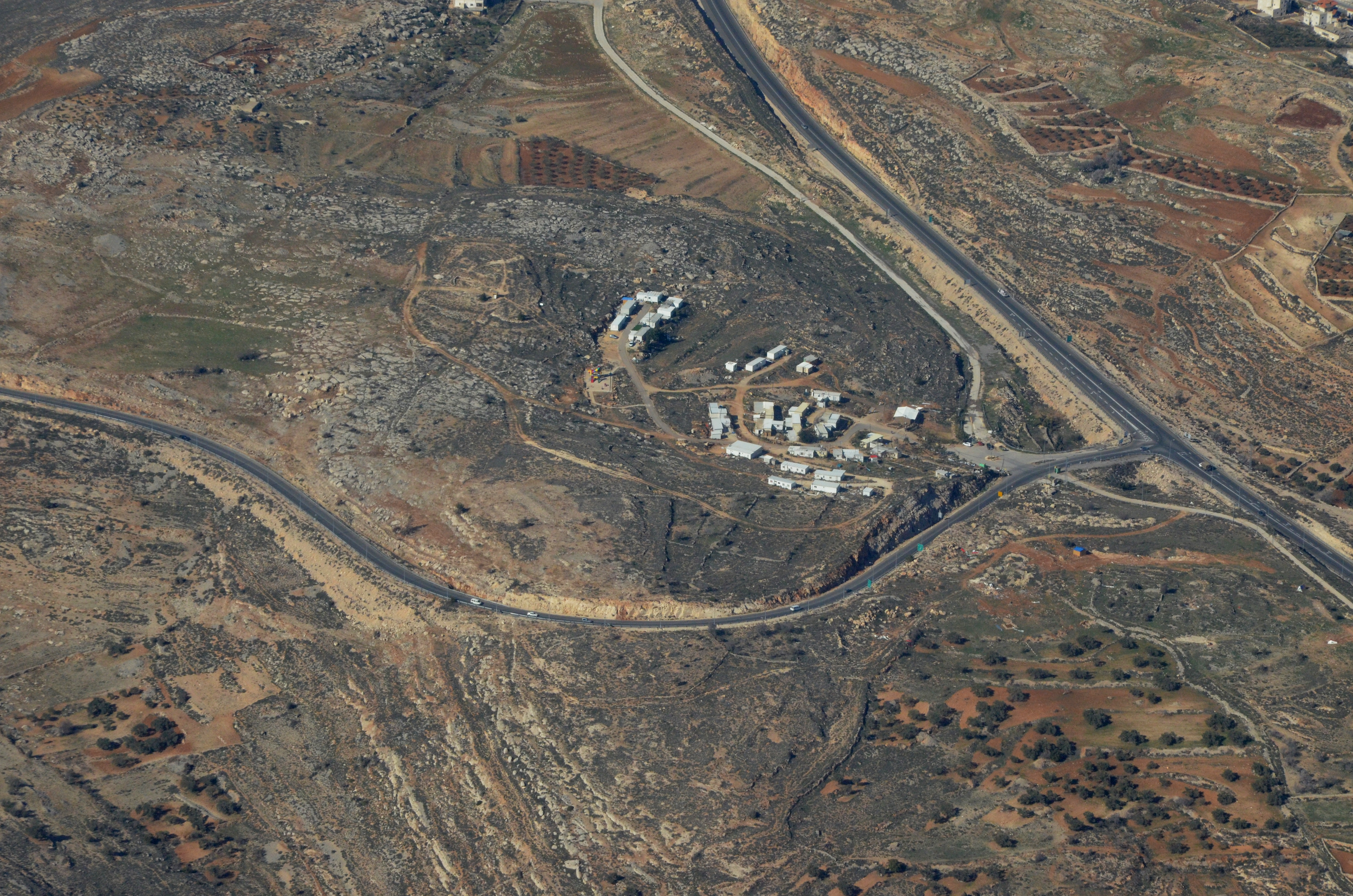 גבעת אסף